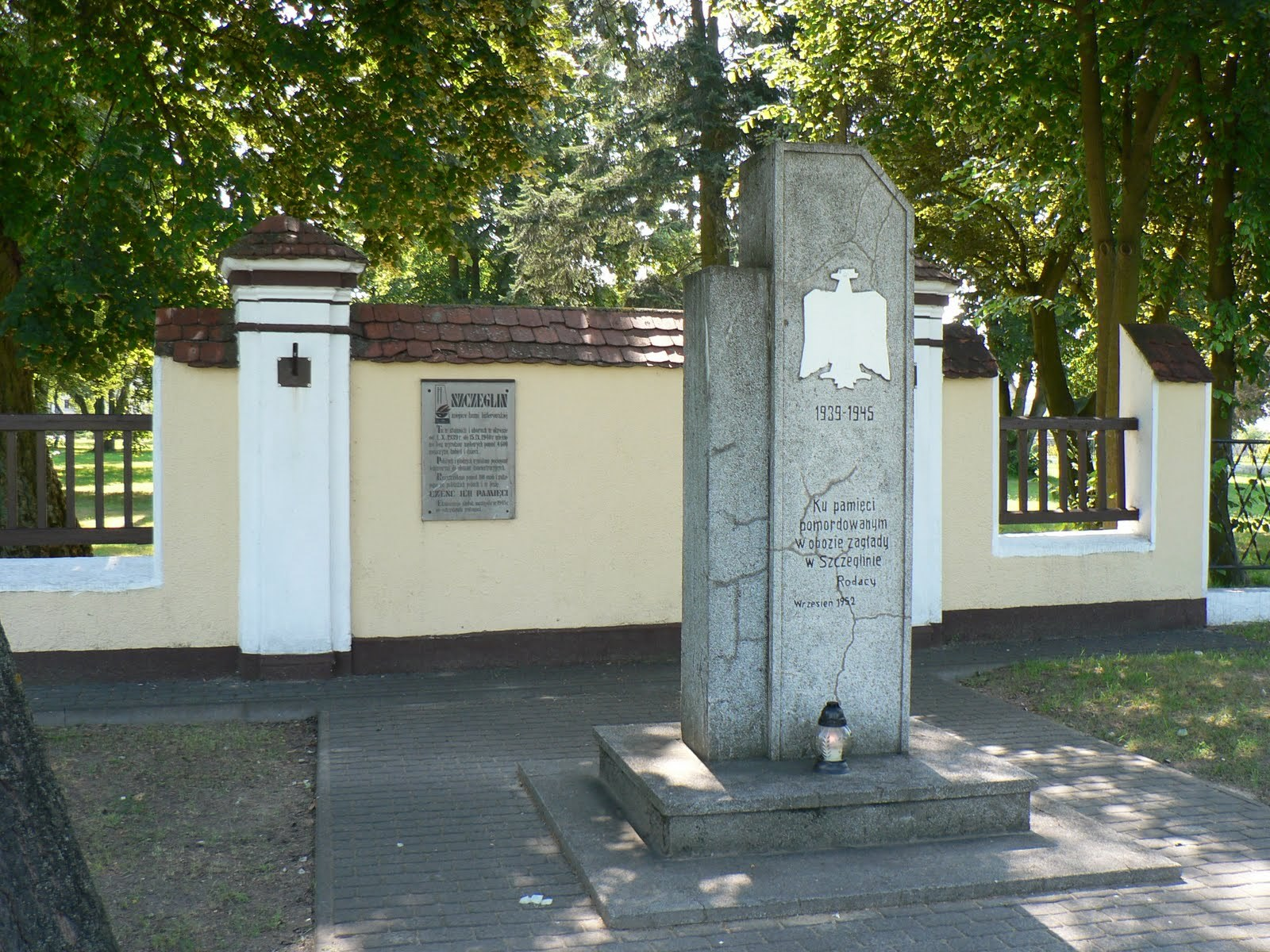 Pomnik pomordowanych przez Niemców w Szczeglinie